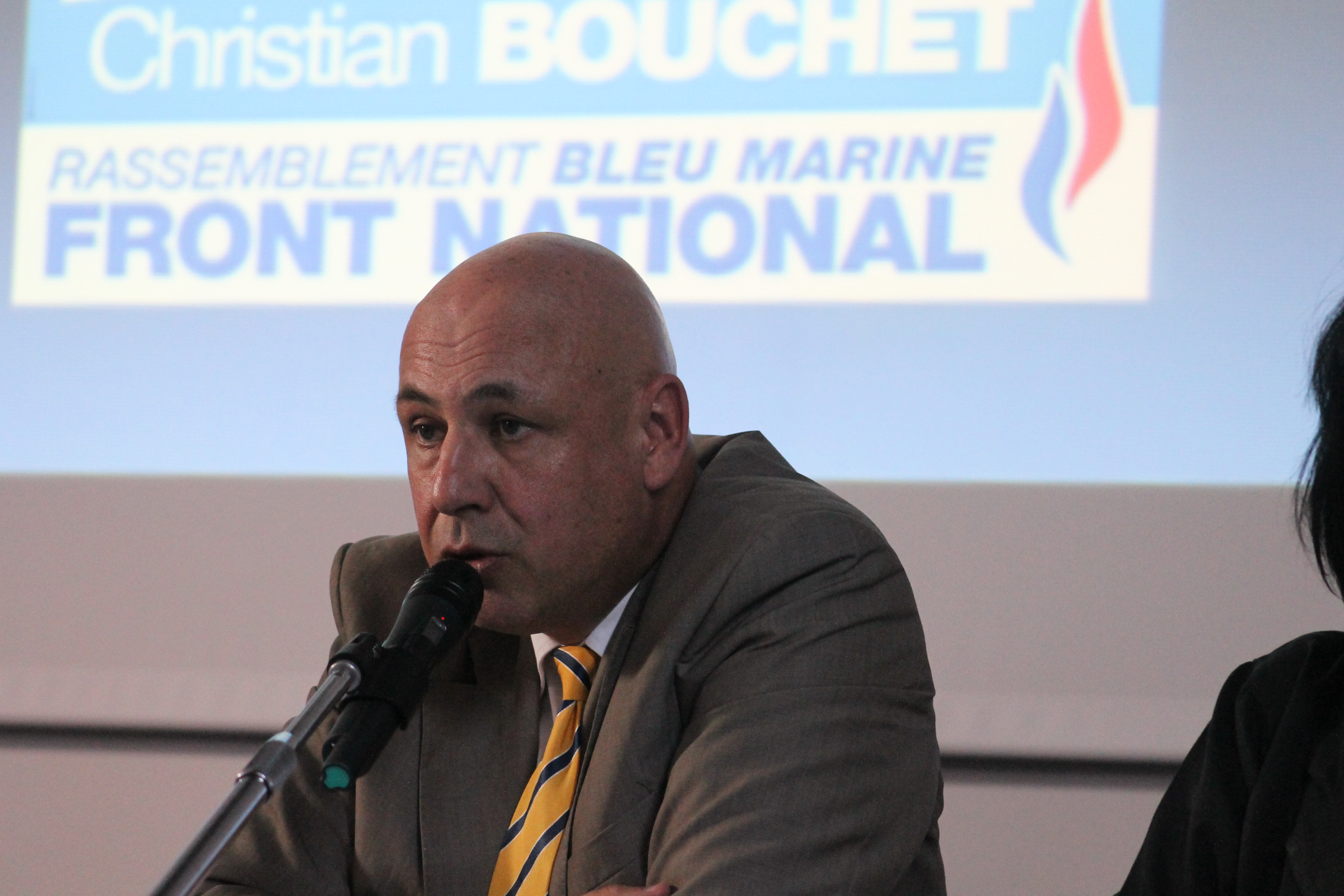 Christian Bouchet à une réunion publique du Front national (FN) de la Loire-Atlantique, le 24 mai 2012